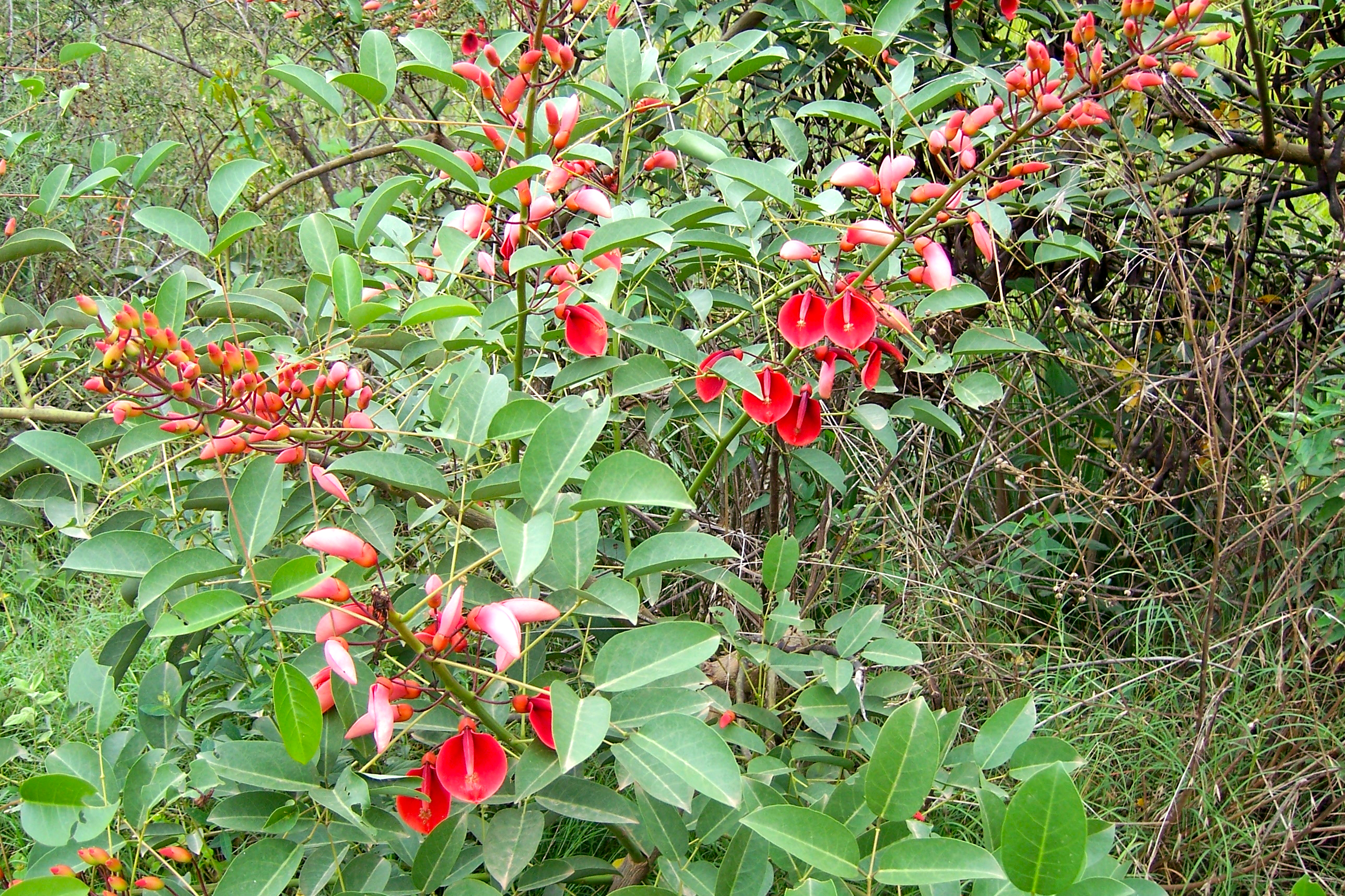 Ceibo (Erythrina crista-galli), flor nacional de Uruguay. Imagen tomada en Balneario Iporá, departamento de Tacuarembó.